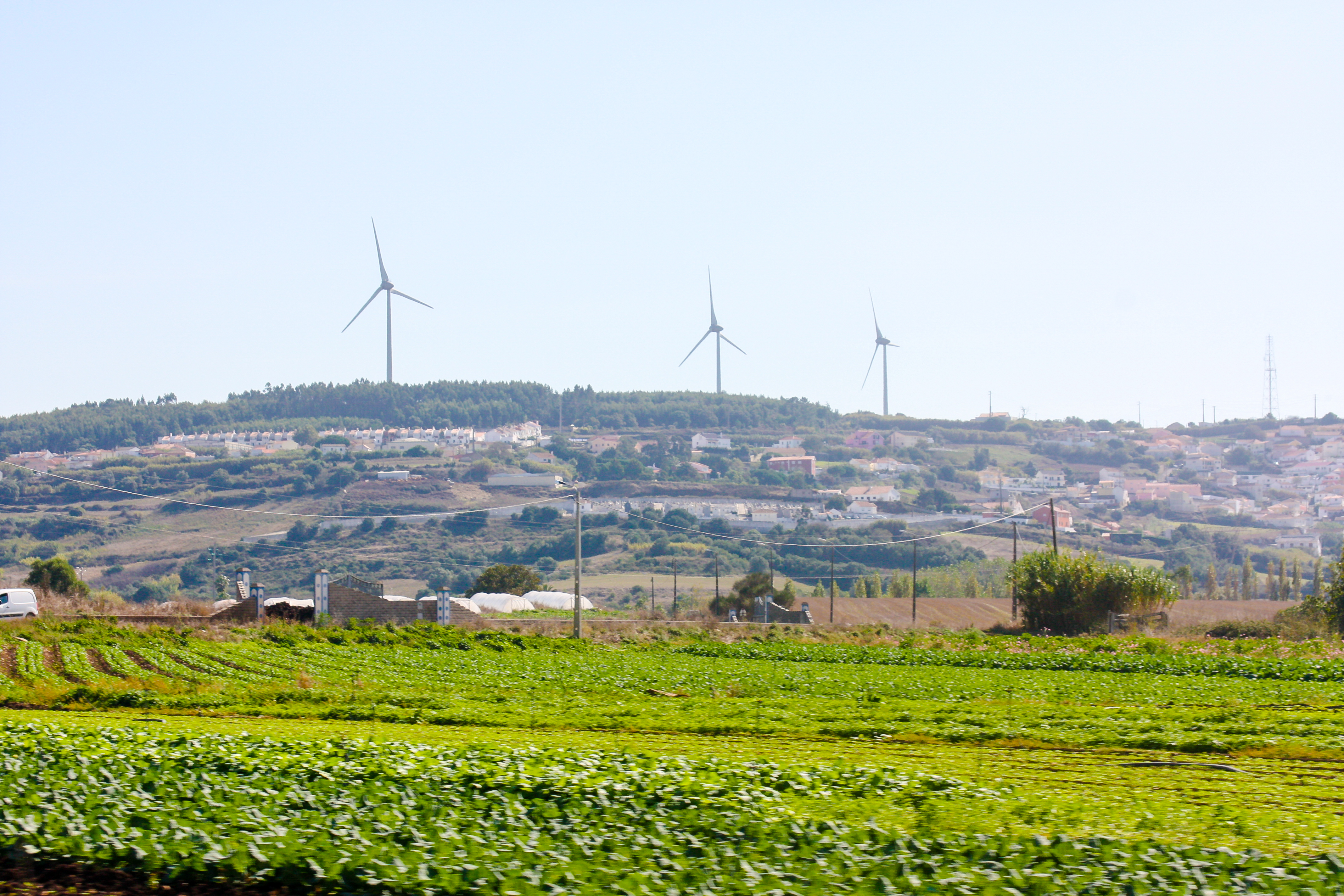 Aspeto da várzea de Alfouvar.